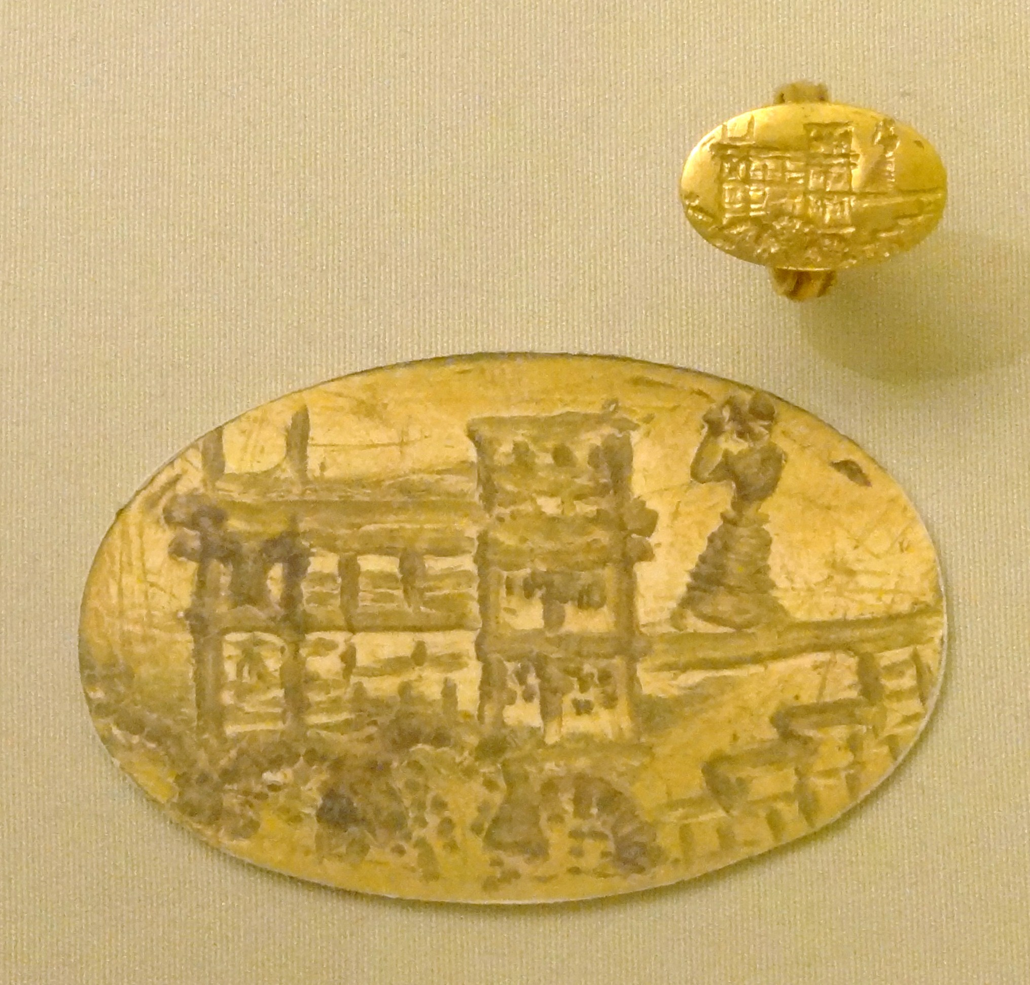 Minoischer Siegelring und entsprechender vergrößerter Abdruck aus Poros, ausgestellt im Archäologischen Museum Iraklio, Kreta, Griechenland